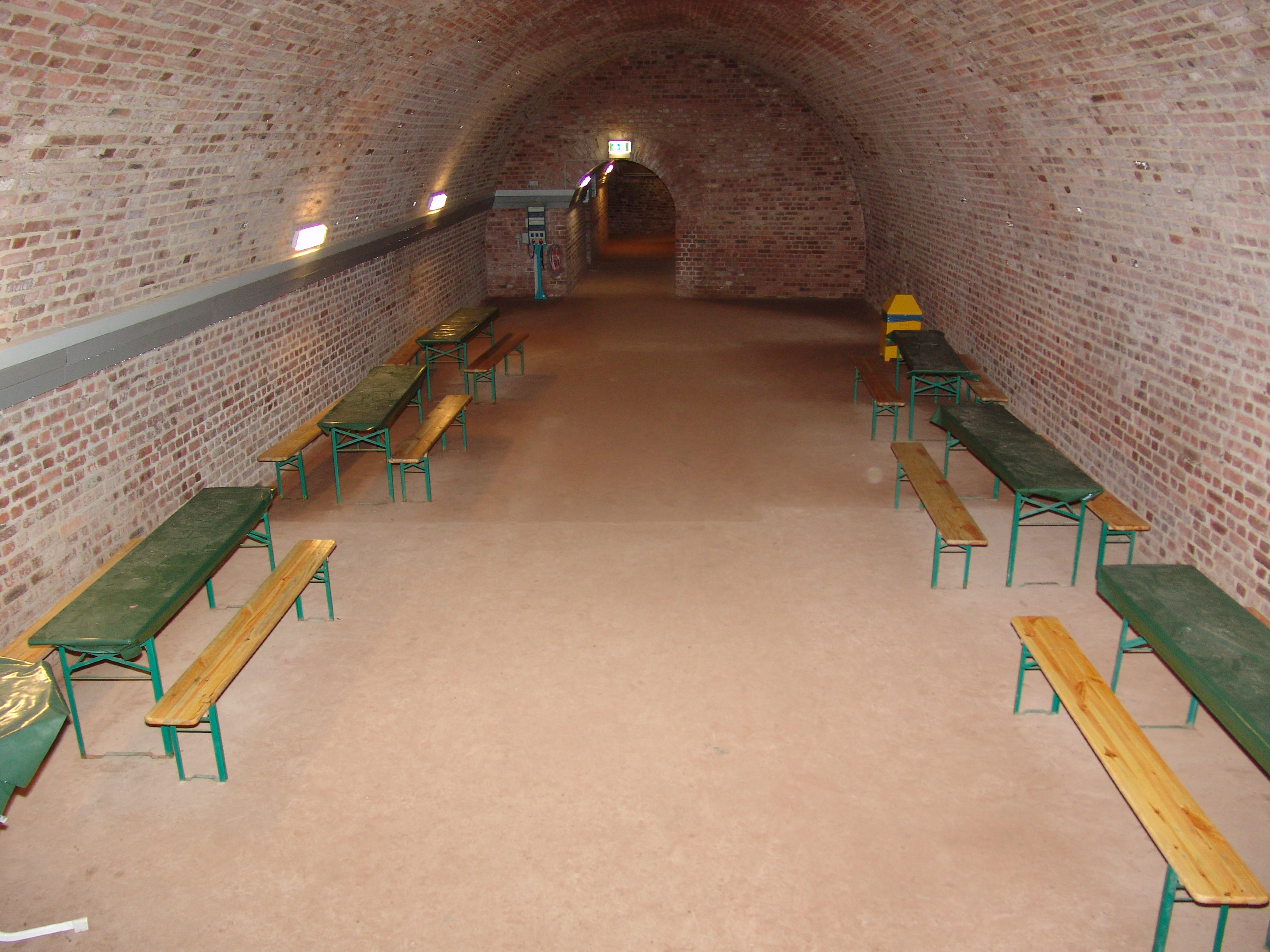 Bei den Schlossberghöhlen wurde eine Bunkeranlage errichtet.